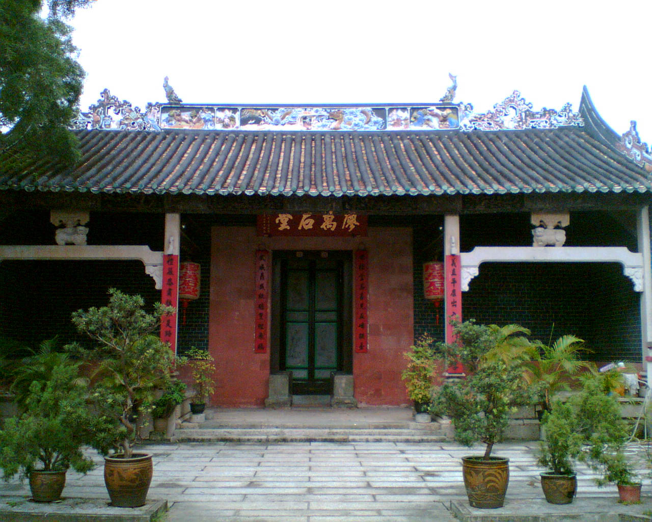 上水廖萬石堂